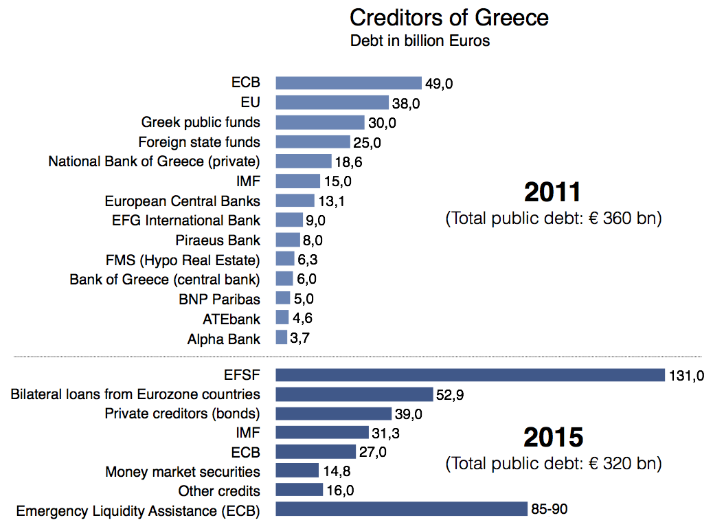 Creditors of Greece 2011 and 2015 Data